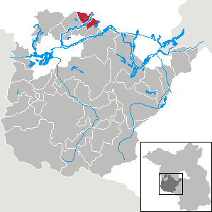 Päwesin in Brandenburg (Country) - District Potsdam-Mittelmark